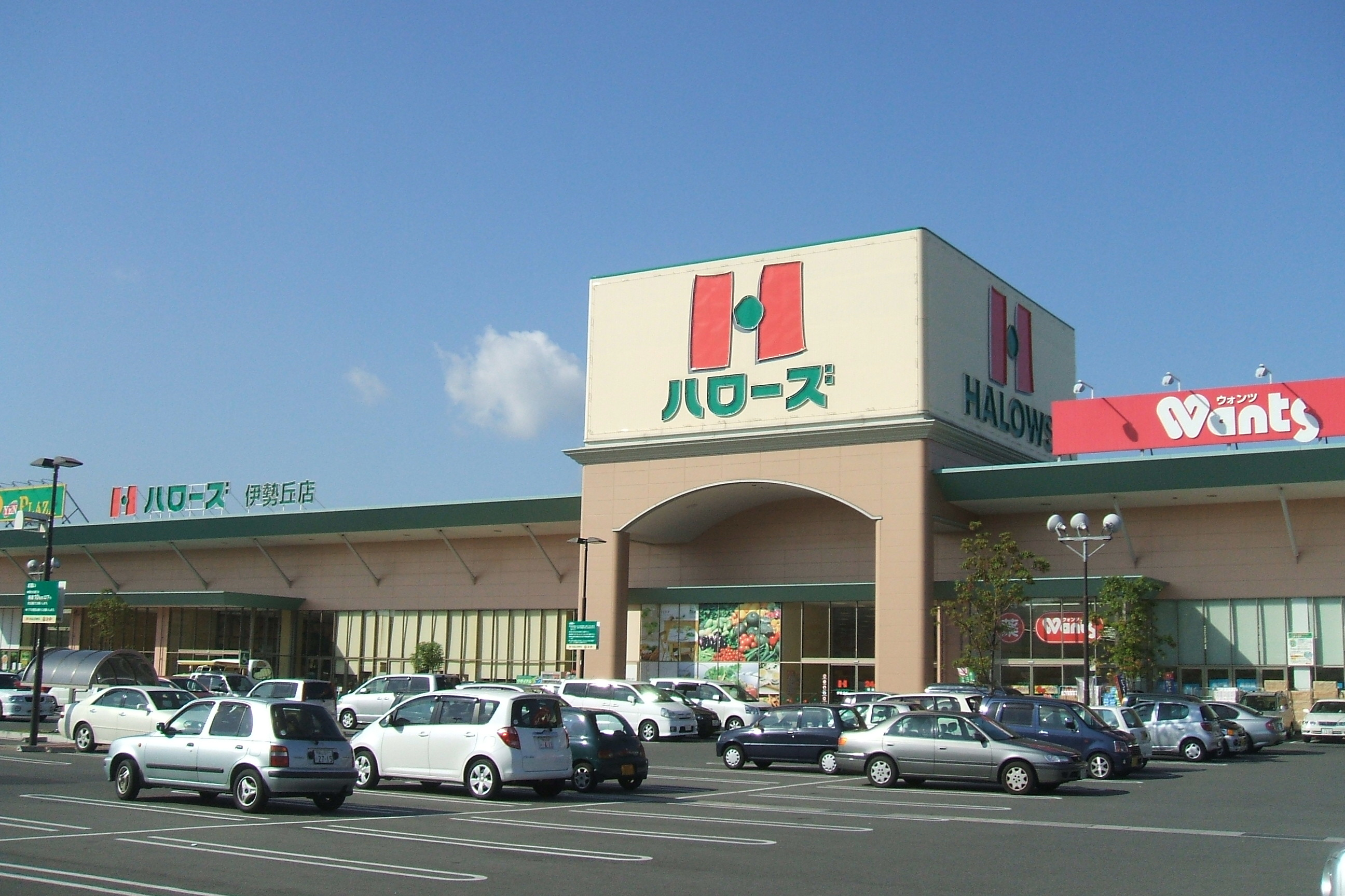 広島県福山市を中心に展開する24時間営業スーパーストアーのハローズ伊勢丘店の外観